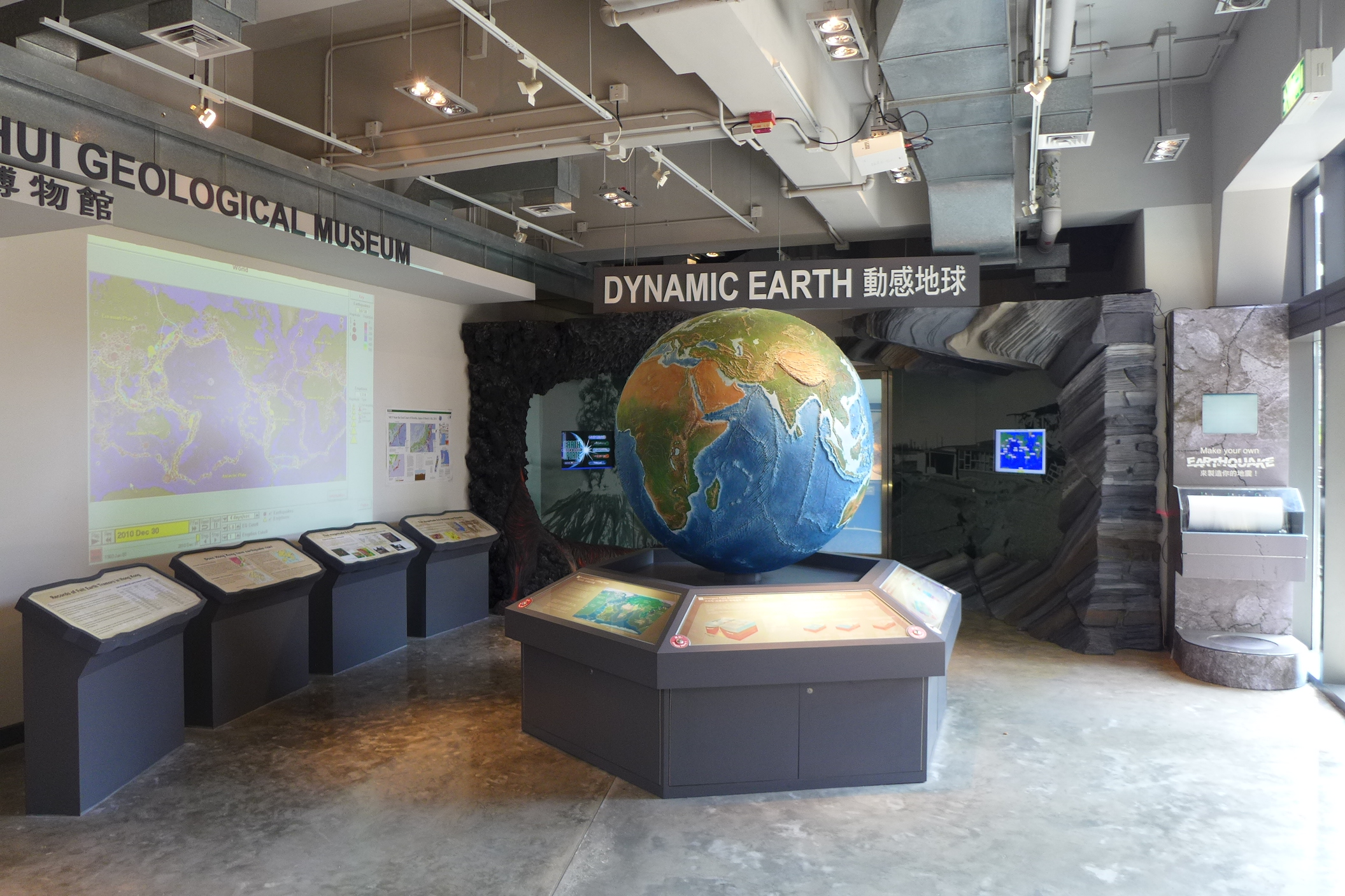 Stephen Hui Geological Museum